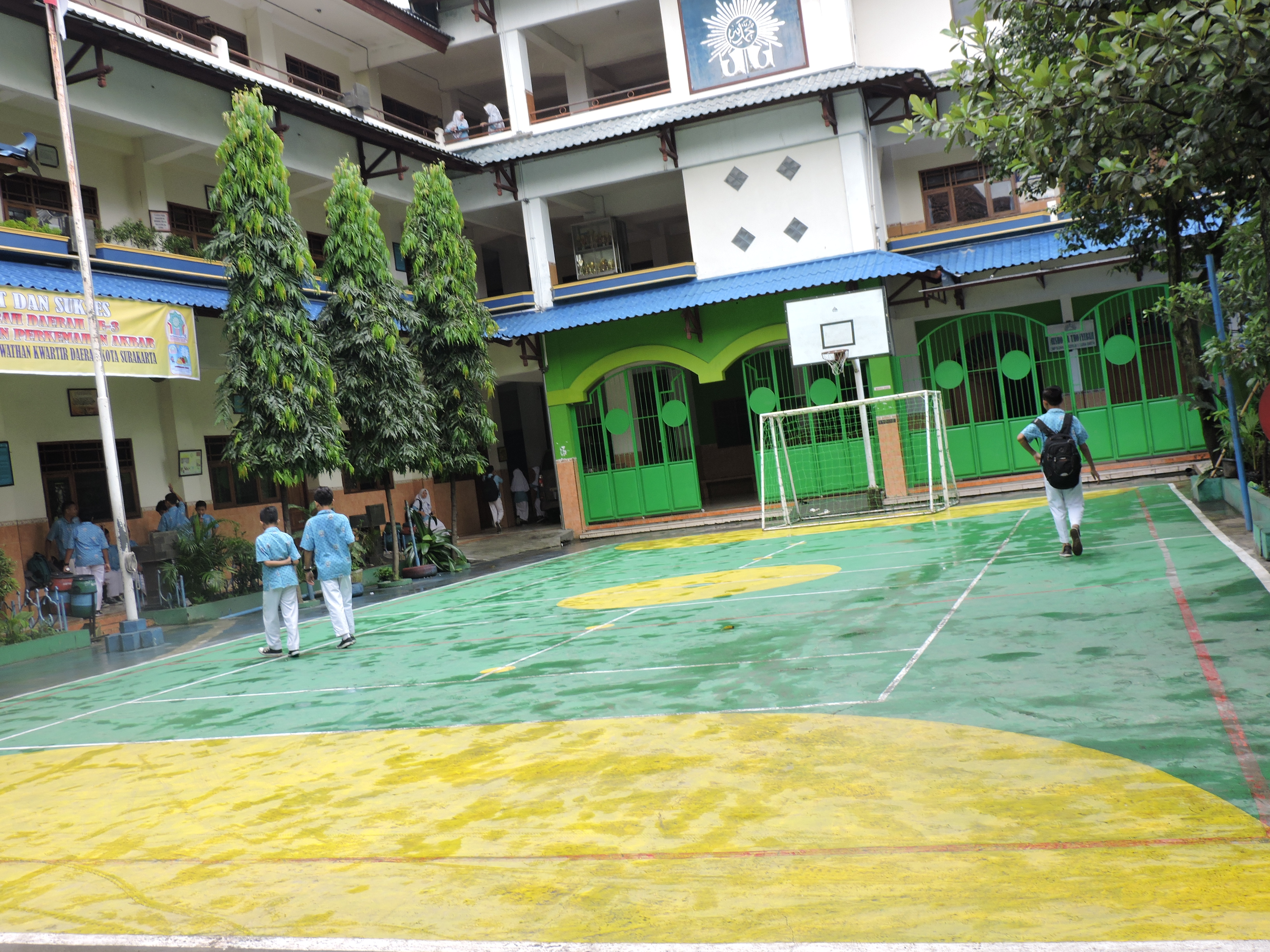 Gedung SMP Muhammadiyah 1 surakarta tampak samping (2017)